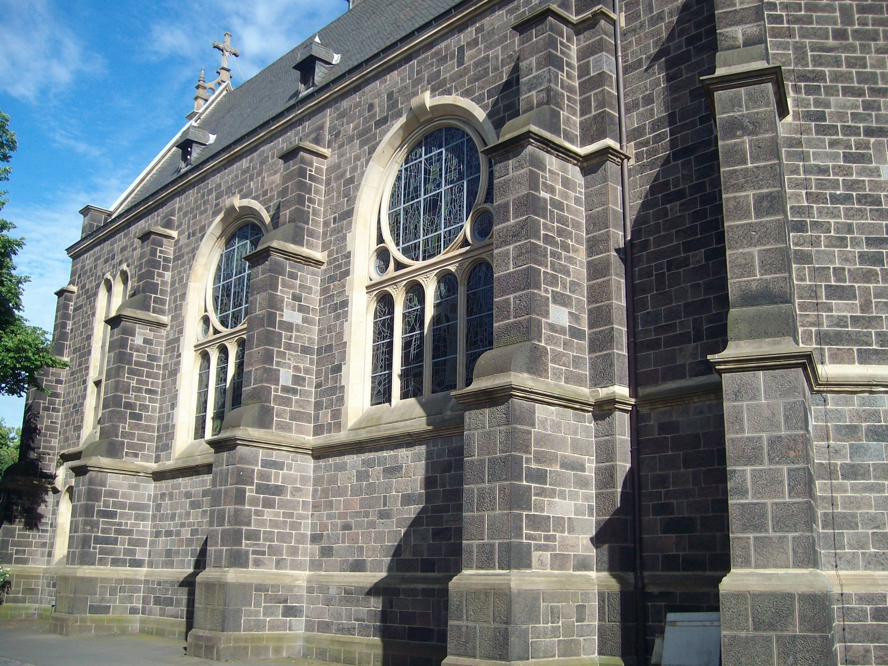 Nordseite der Johanneskirche in Gießen, Hessen